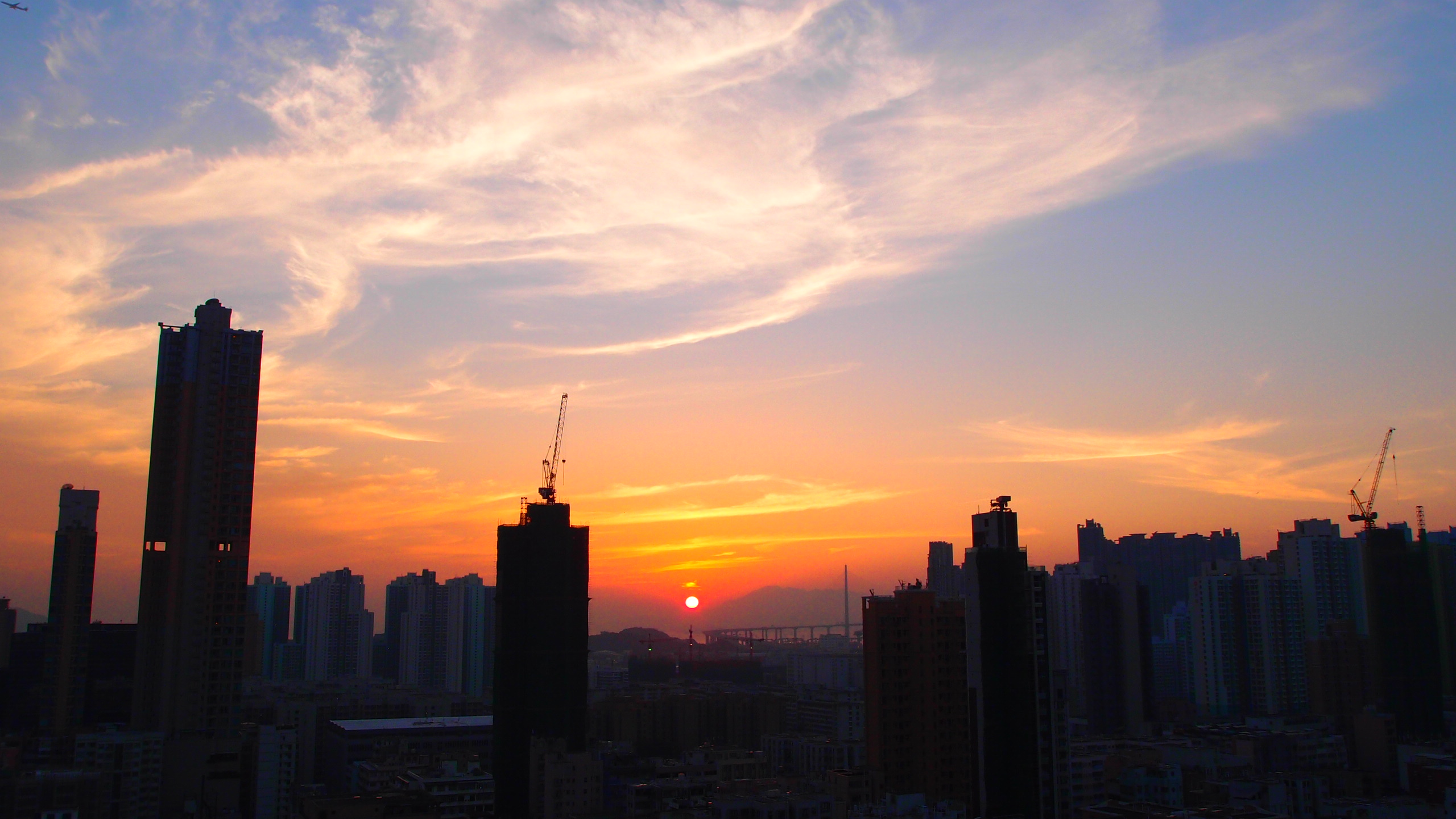 中文（香港）: 攝於嘉頓山，深水埗日落，可遠眺昂船洲大橋